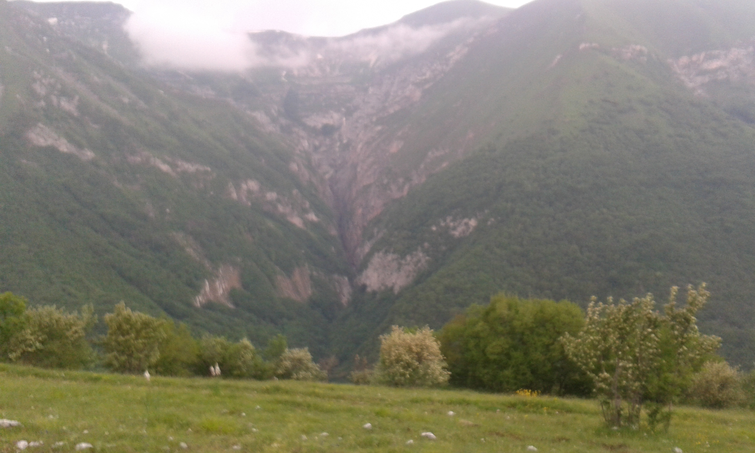 Monte Rotondo - Monte Cacamillo - Monte Pietralata - Punta Bambucerta - Valle dell'Acquasanta